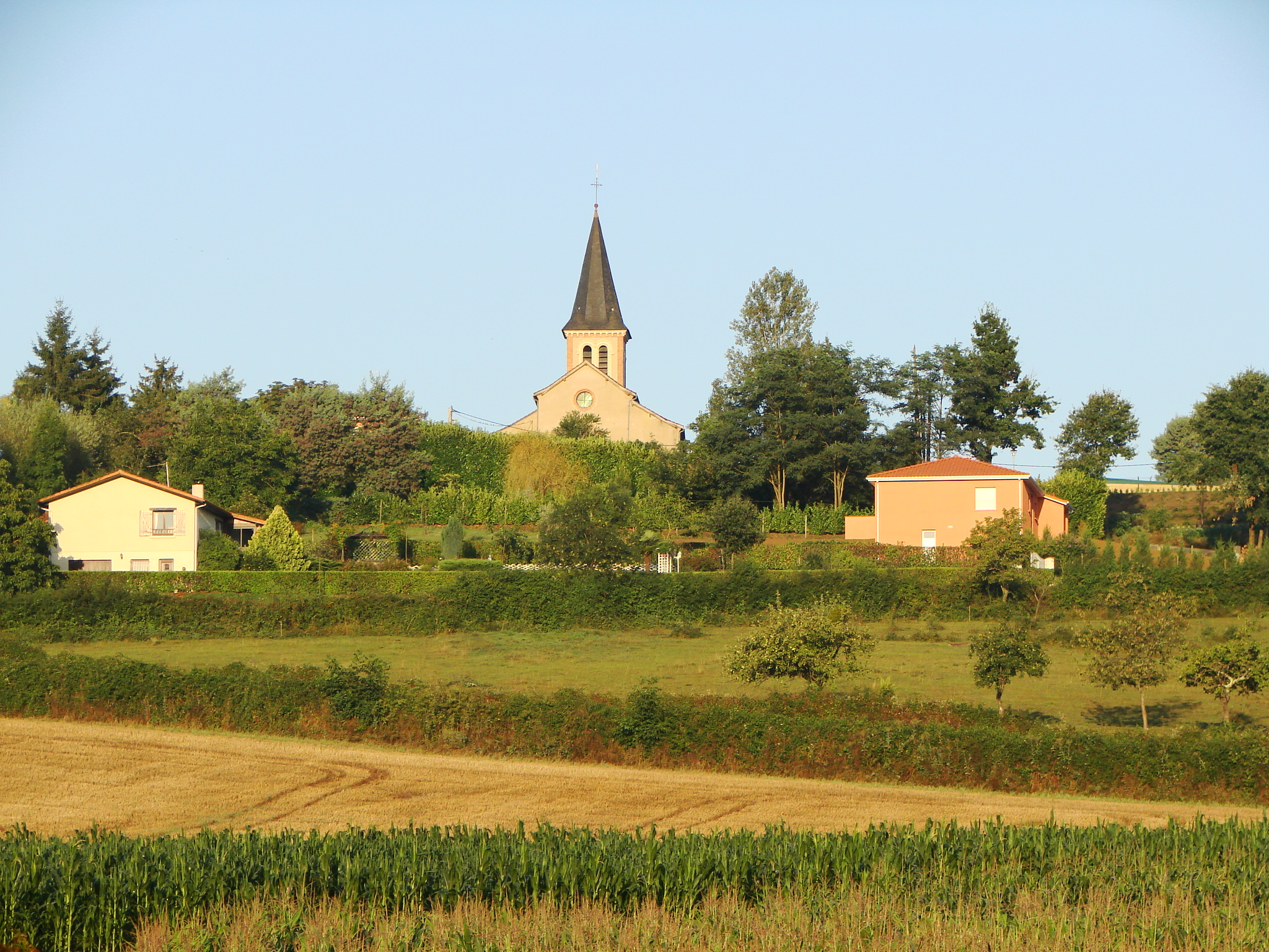 Vue du village de Dours dans les Hautes-Pyrénées (France) : Vue de l'église en contre-bas de la colline (vallée de la rivière Loulès)